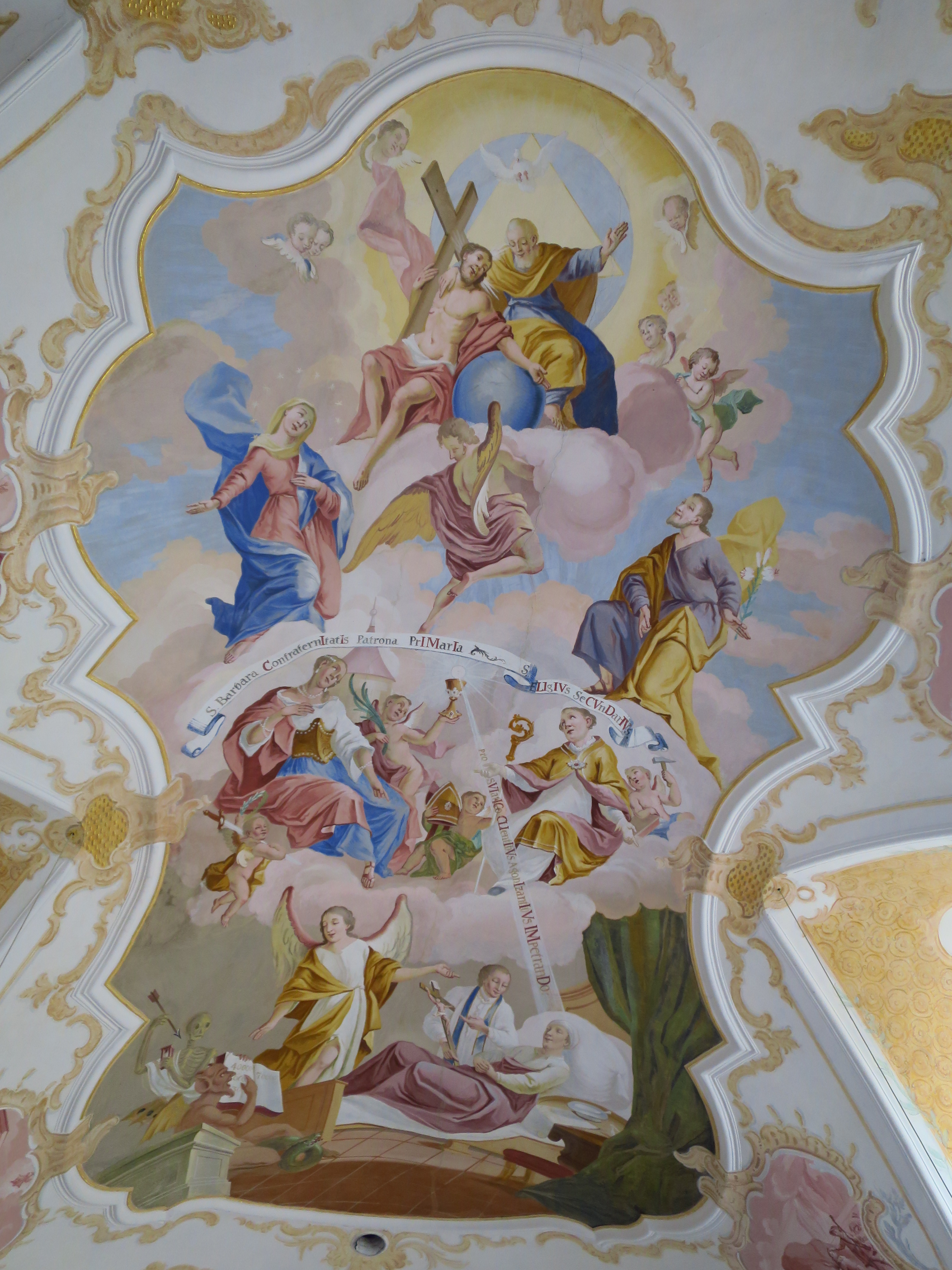 Deckenfresko von J.G.Gail,1772.